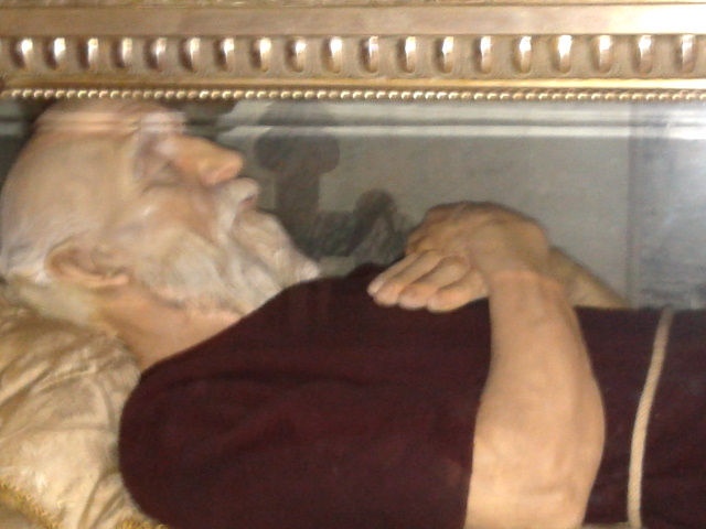 Statua di cera contenente le reliquie di Sant'ampelio, realizzata da Giuseppe Balbo (Chiesa Santa Maria Maddalena, Bordighera)